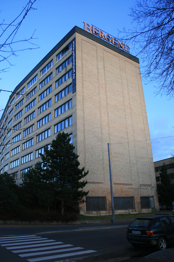 Københavngata 10 in Oslo, Norway